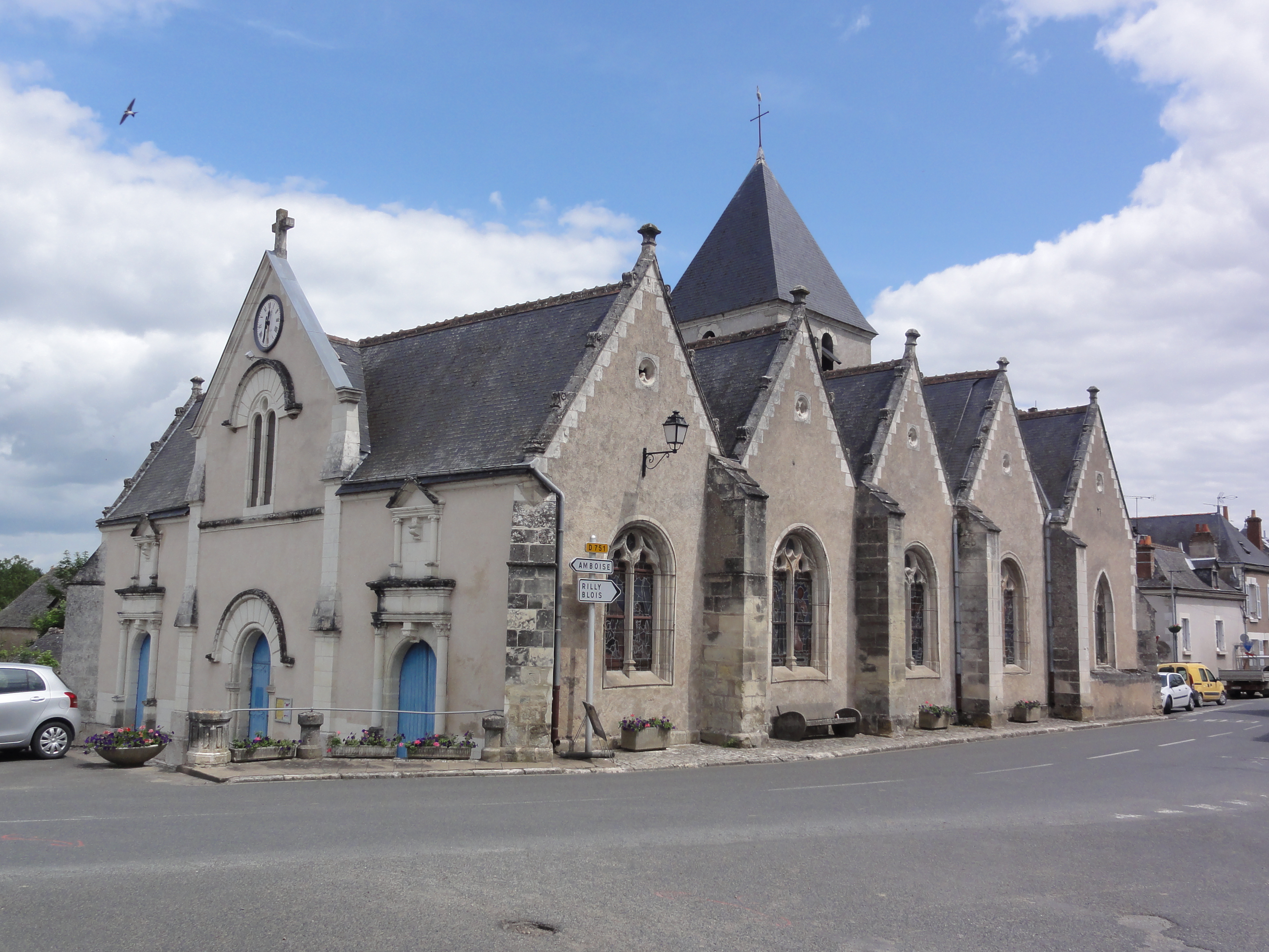 Mosnes (Indre-et-Loire) .